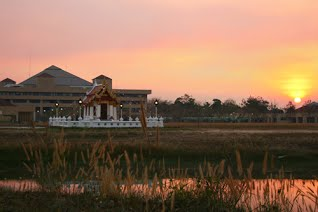 หอพระหลวงพ่อสิงห์ สิ่งศักดิ์สิทธิ์ประจำมหาวิทยาลัยเทคโนโลยีพระจอมเกล้าพระนครเหนือ วิทยาเขตปราจีนบุรี